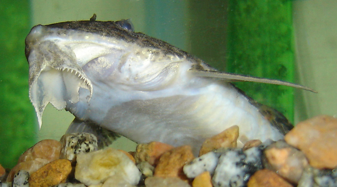 Rineloricaria longicauda FishBase